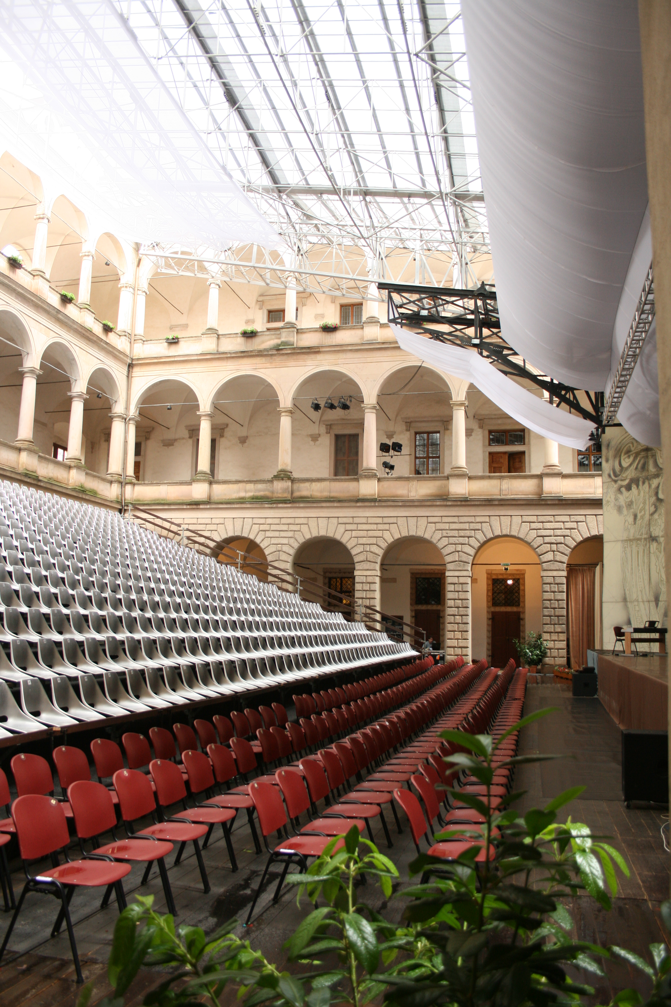 Druhé nádvoří zámku v Litomyšli s připraveným pódiem a hledištěm pro představení v rámci mezinárodního operního festivalu Smetanova Litomyšl.